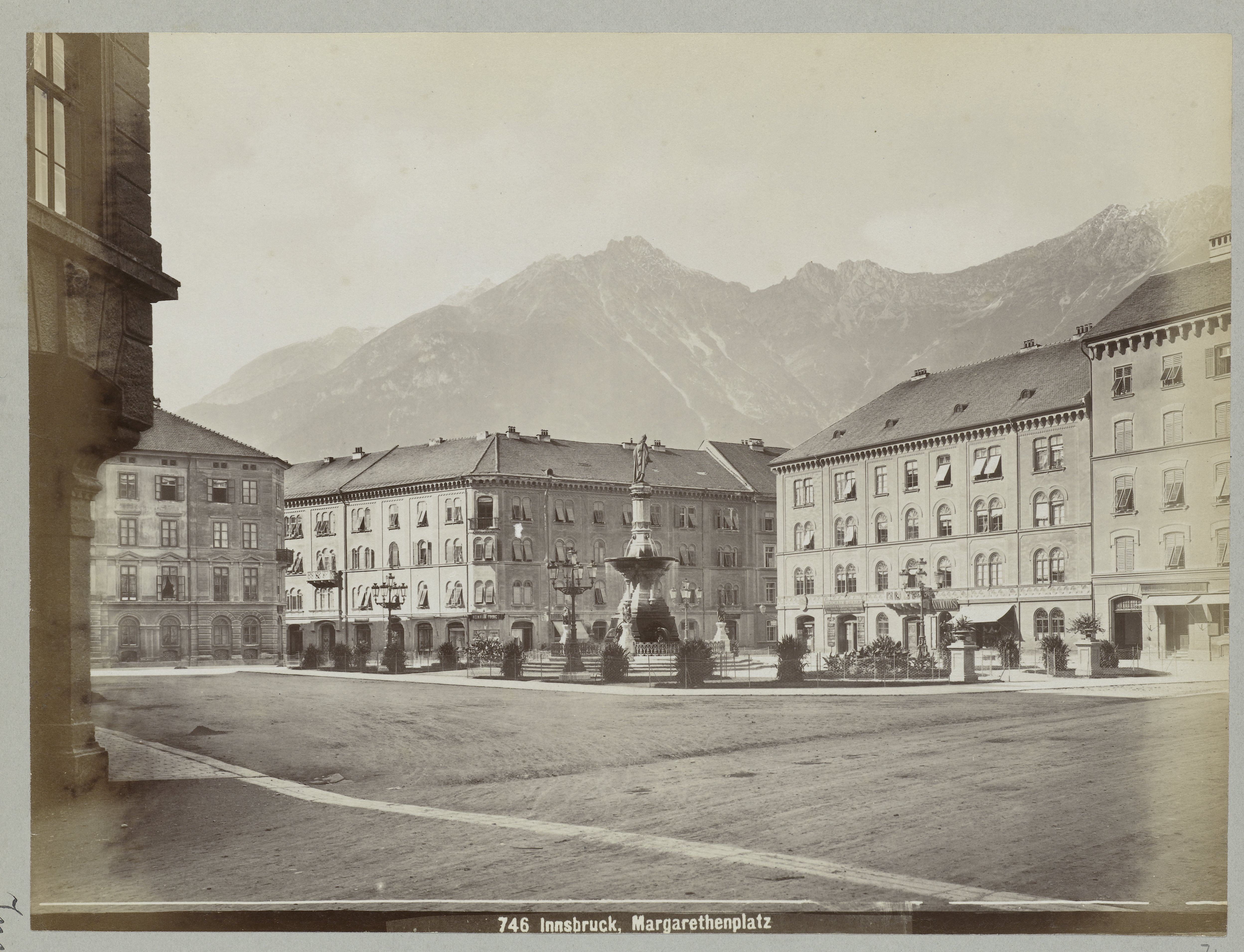 IdentificatieTitel(s): Zicht over Margarethenplatz, InnsbruckInnsbruck (titel op object)746 Innsbruck Margarethenplatz (titel op object)Objecttype: foto Objectnummer: RP-F-2007-358-71Omschrijving: Zicht over Margarethenplatz (vanaf 1923 Bozner platz), met op de achtergrond besneeuwde bergtoppen.VervaardigingVervaardiger: fotograaf: anoniem (vermeld op object)Plaats vervaardiging: fotograaf: OostenrijkNederlandDatering: ca. 1893 - ca. 1903Fysieke kenmerken: foto op karton in albumMateriaal: fotopapier karton Techniek: albuminedrukAfmetingen: foto: h 200 mm × b 262 mmblad: h 309 mm × b 507 mmToelichtingSinds 1923 wordt het plein Bozner platz genoemd.OnderwerpWaar: InnsbruckVerwerving en rechtenCredit line: Schenking van de erven van de heer H. Pauw van Wie: ldrecht, Den HaagVerwerving: schenking 11-dec-2008Copyright: Publiek domein